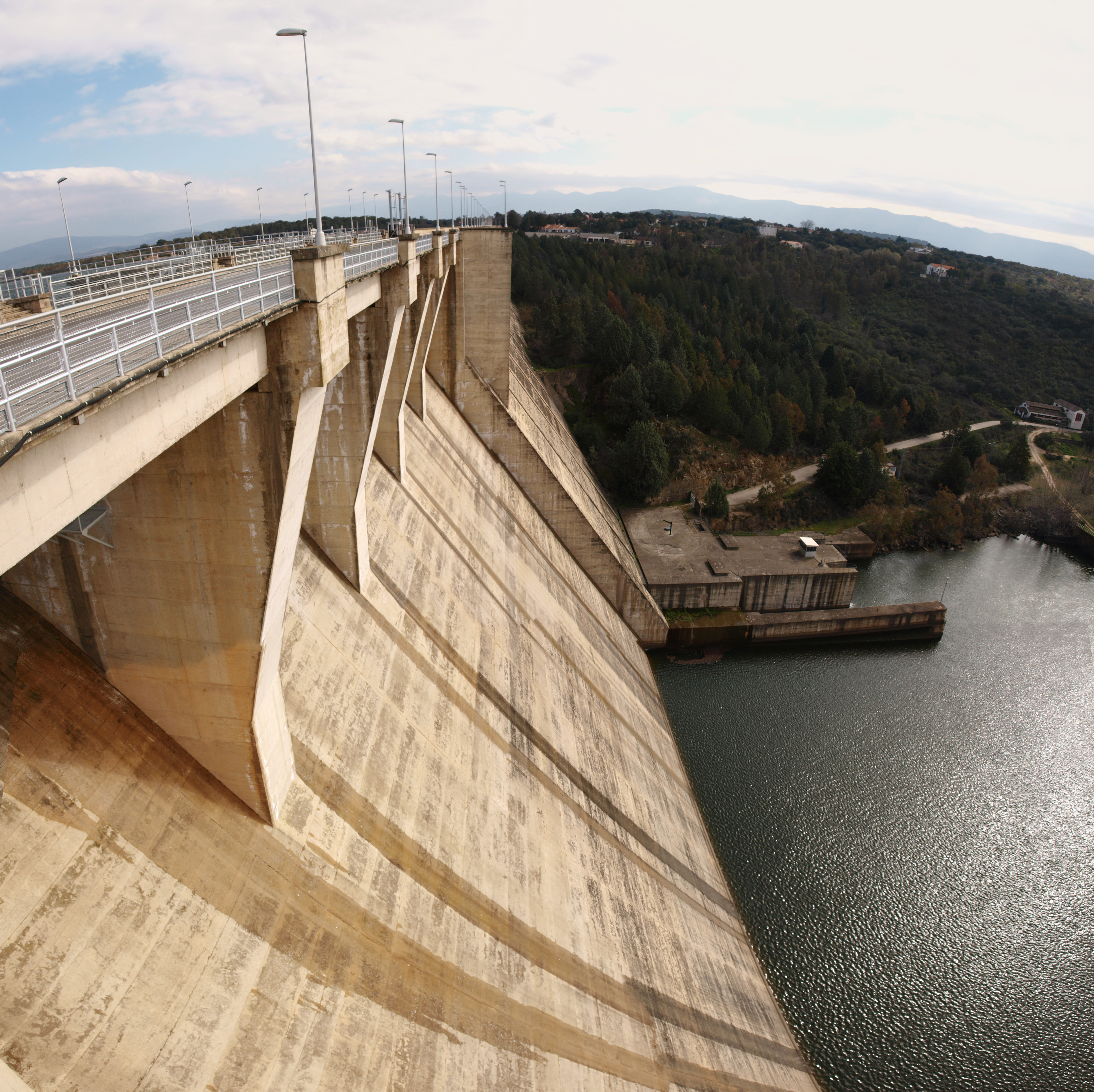 Presa del pantano de Gabriel y Galán en Guijo de Granadilla (Cáceres) [España]